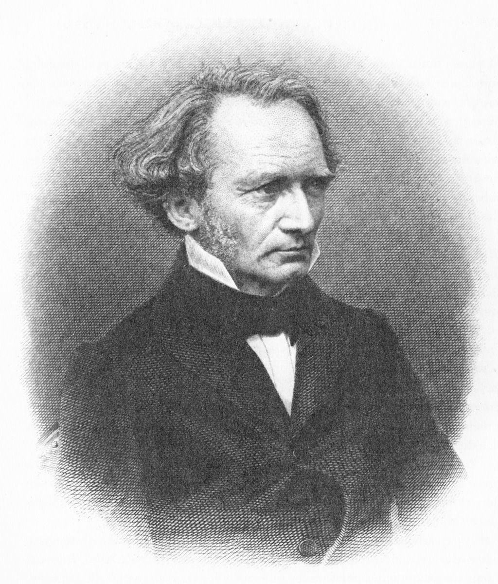 Hermann Härtel, Musikverleger und Erbauer des Römischen Hauses in Leipzig